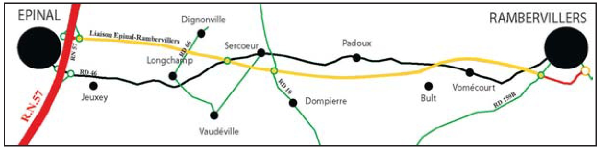 Tracé de la future liaison RD 46 entre Epinal et Rambervillers.